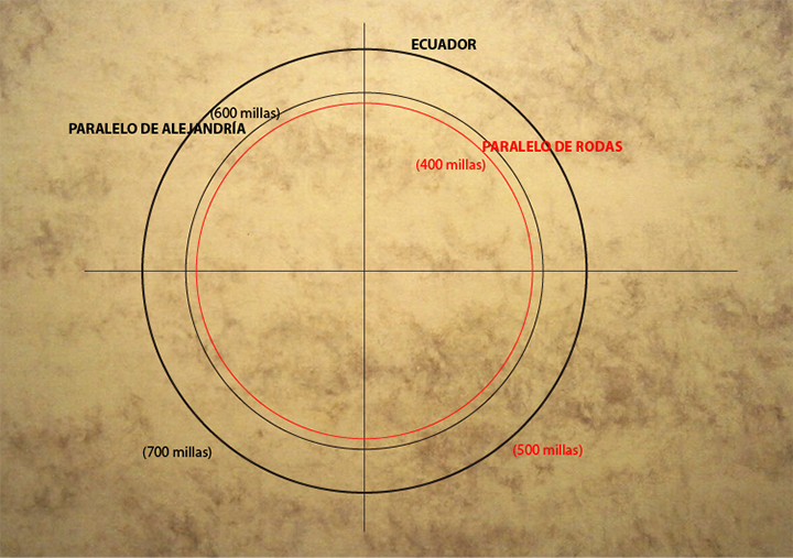 La equivalencia de longitudes entre paralelos